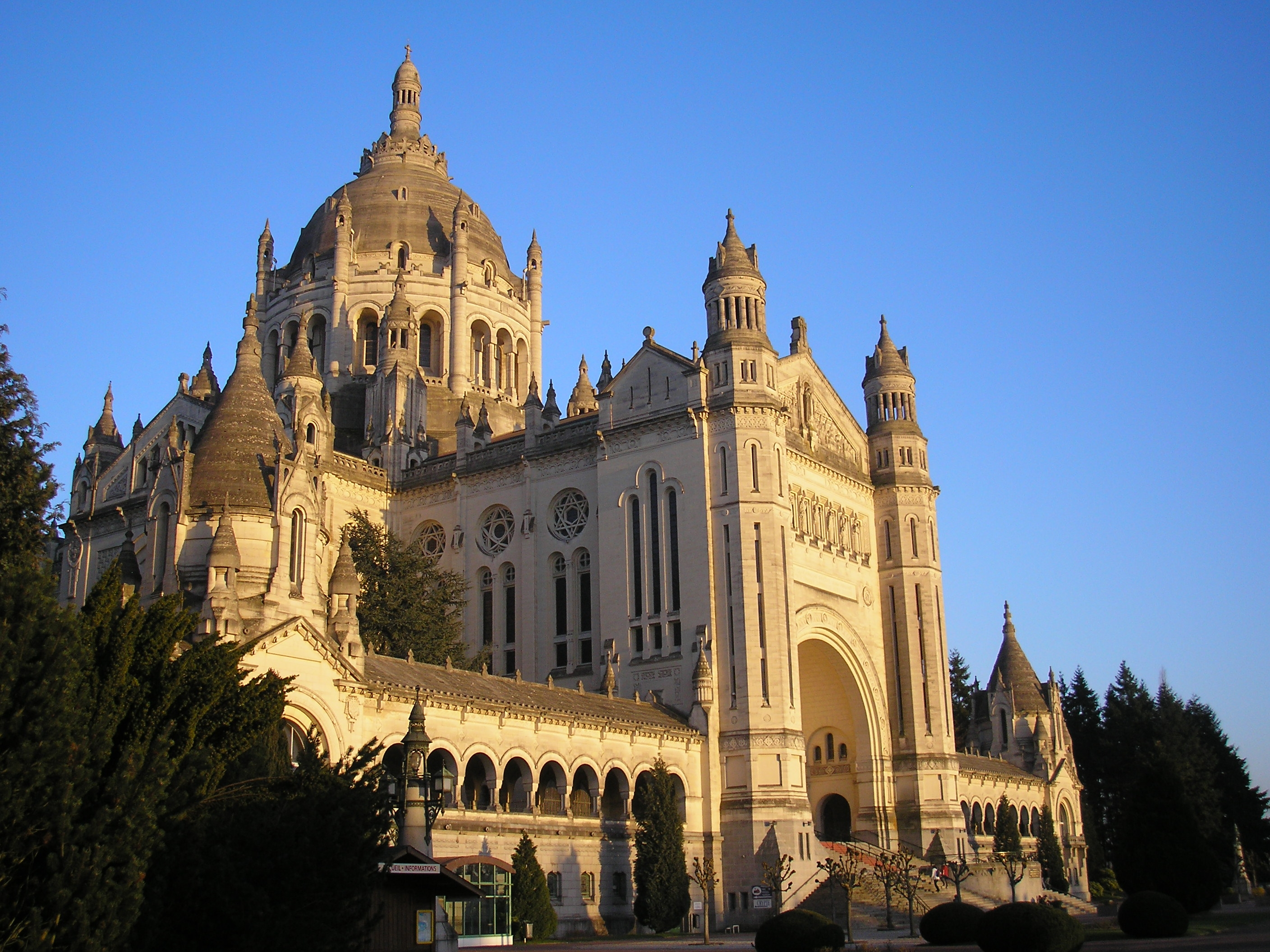 Lisieux (Normandie, France). La basilique Sainte-Thérèse.